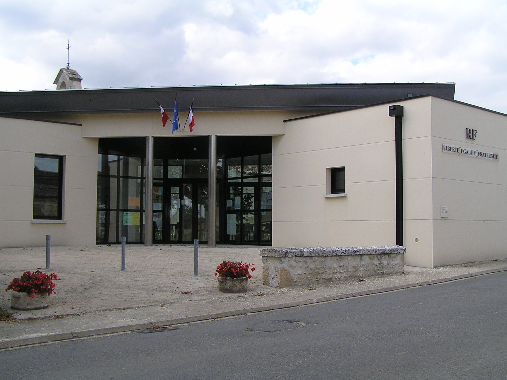 mairie de Mosnac